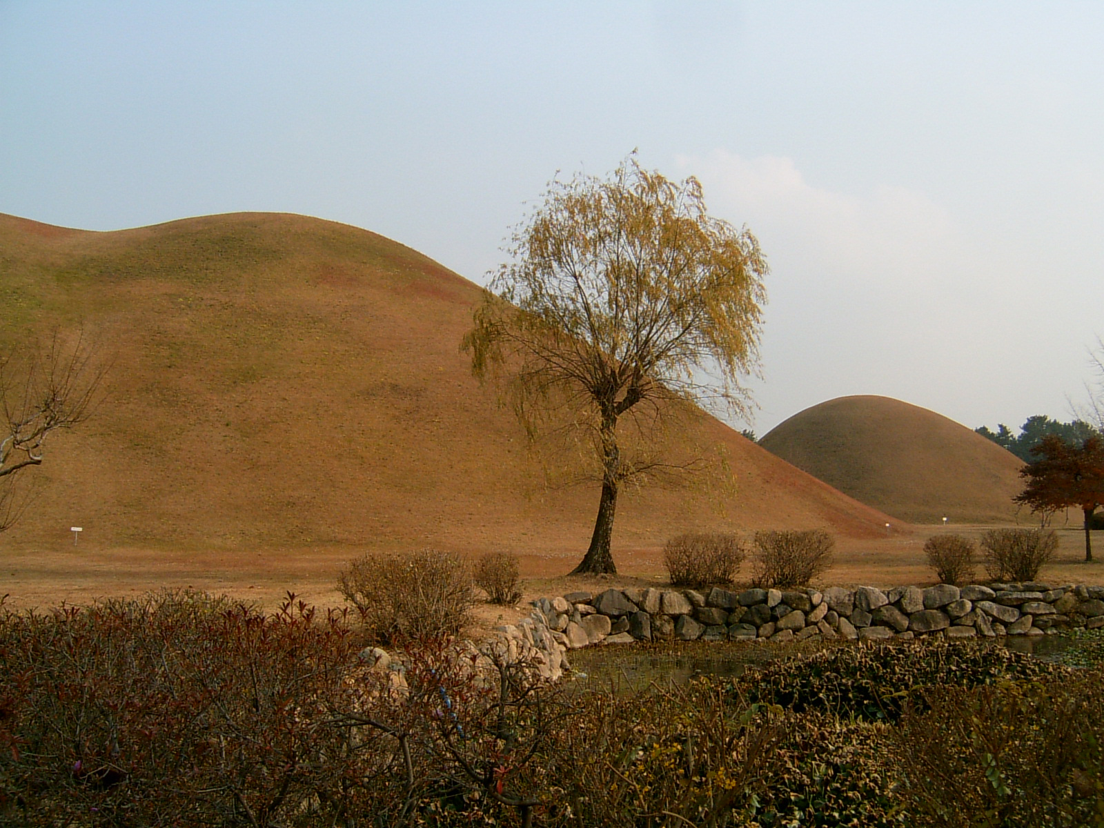 Koninklijke grafheuvels bij Gyeongju, Zuid-Korea. Deze stammen uit het Silla koninkrijk. Foto genomen november 2004